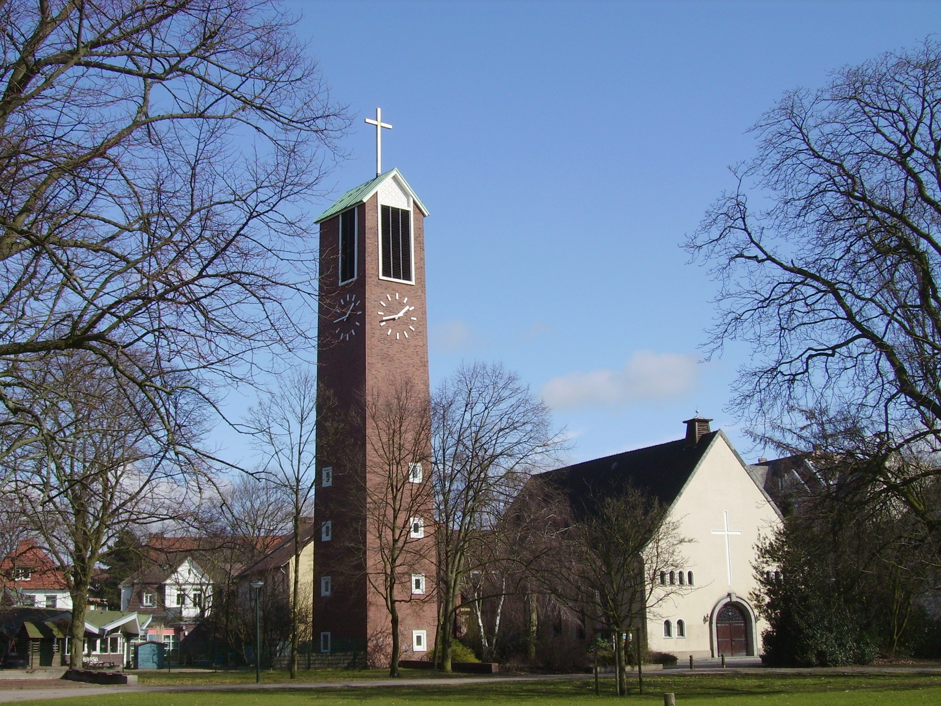 Die evangelisch-lutherische Kreuzkirche in Bremerhaven-Mitte